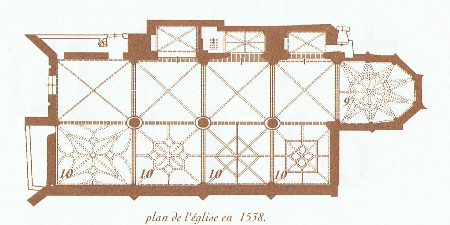 Plan eglise Saint Nicolas en 1538